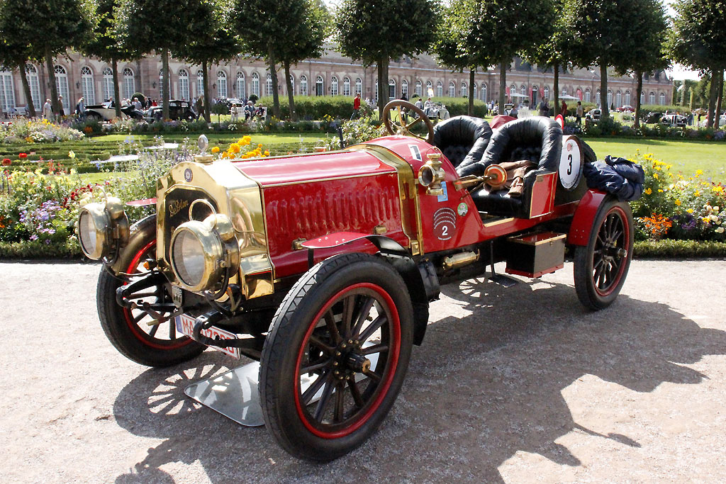 1908 De Dion Bouton GP-Wagen_IMG_1074